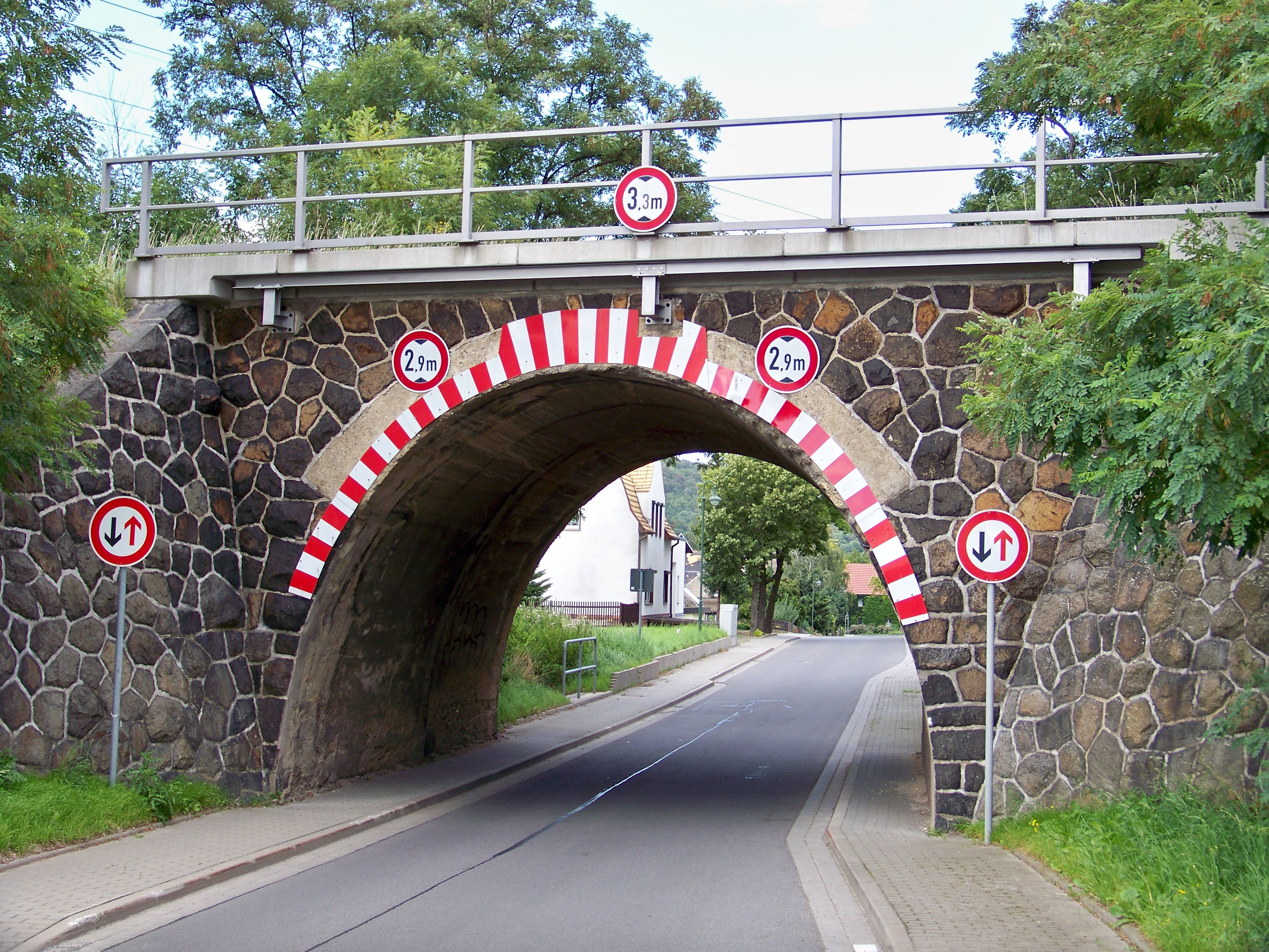 Brücke der Bahnstrecke Eilenburg–Wurzen über die Straße Am Bahnhof in Kleinzschepa (Landkreis Leipzig)